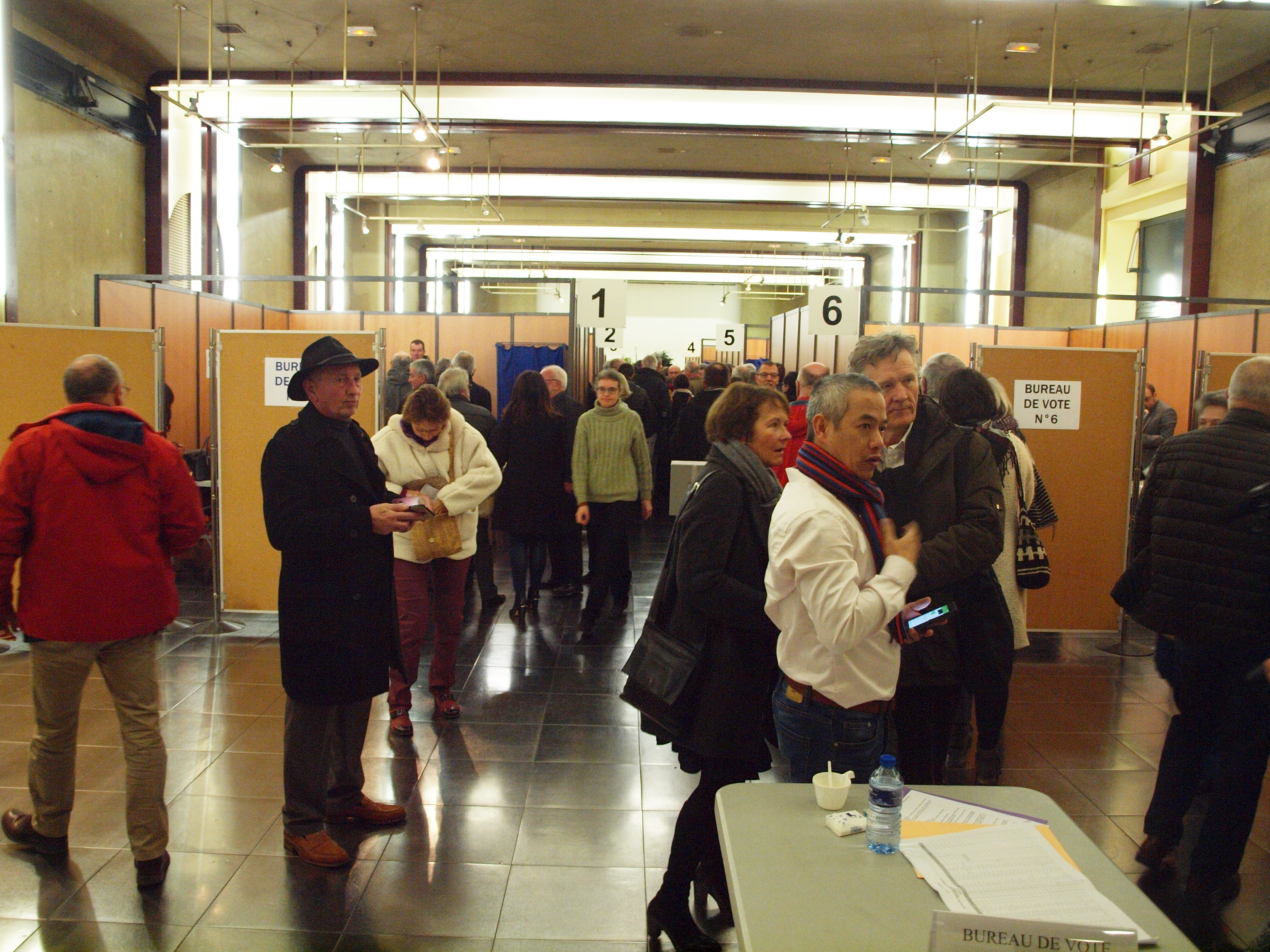 Élection sénatoriale partielle, le 17 décembre 2017, dans l'Yonne, pour le remplacement du marquis De Raincourt, démissionnaire. Le scrutin eut lieu dans la salle Vaulabelle à Auxerre (Yonne, France)